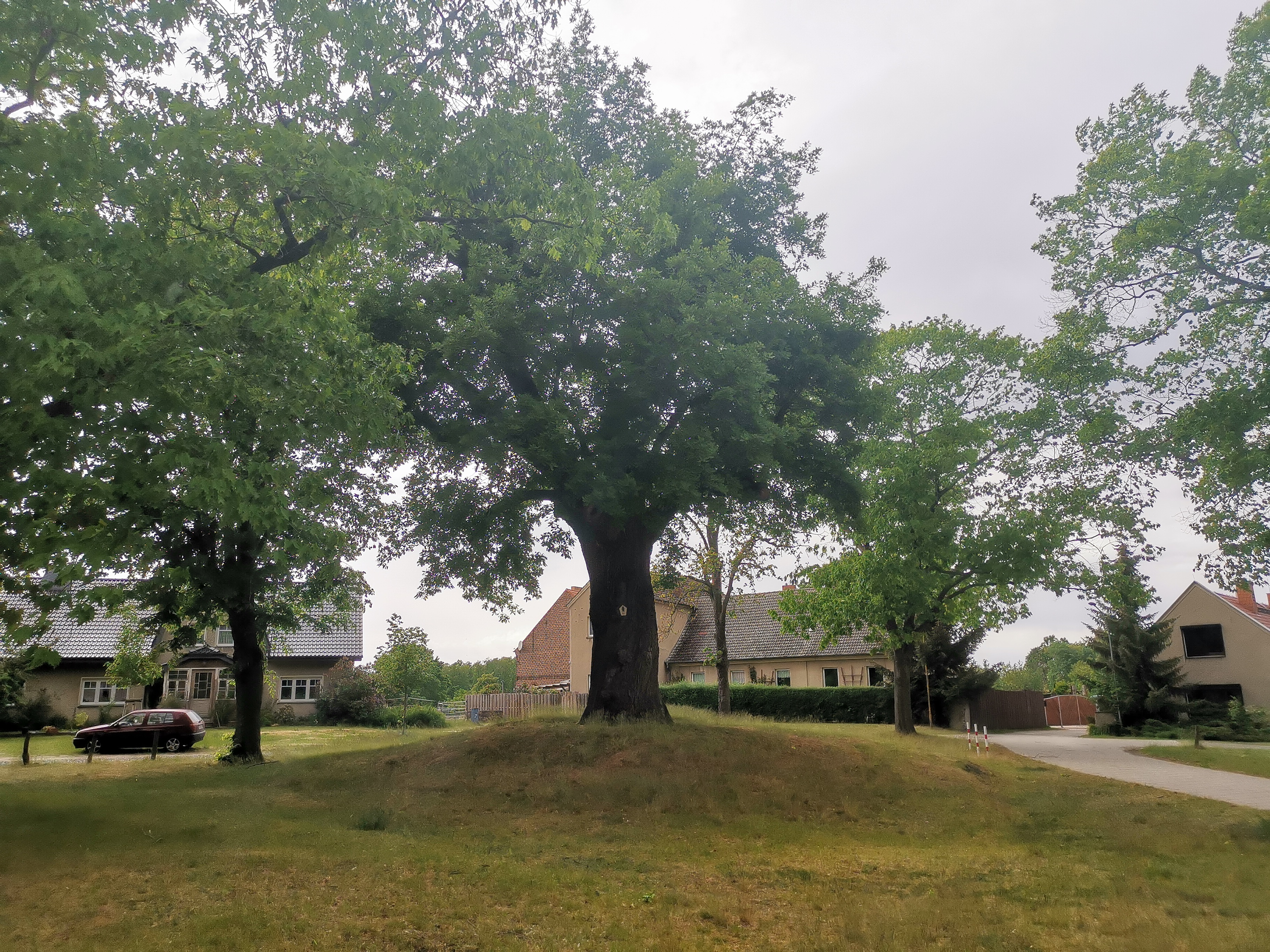 Als Naturdenkmal geschützte Stieleiche in Bugk